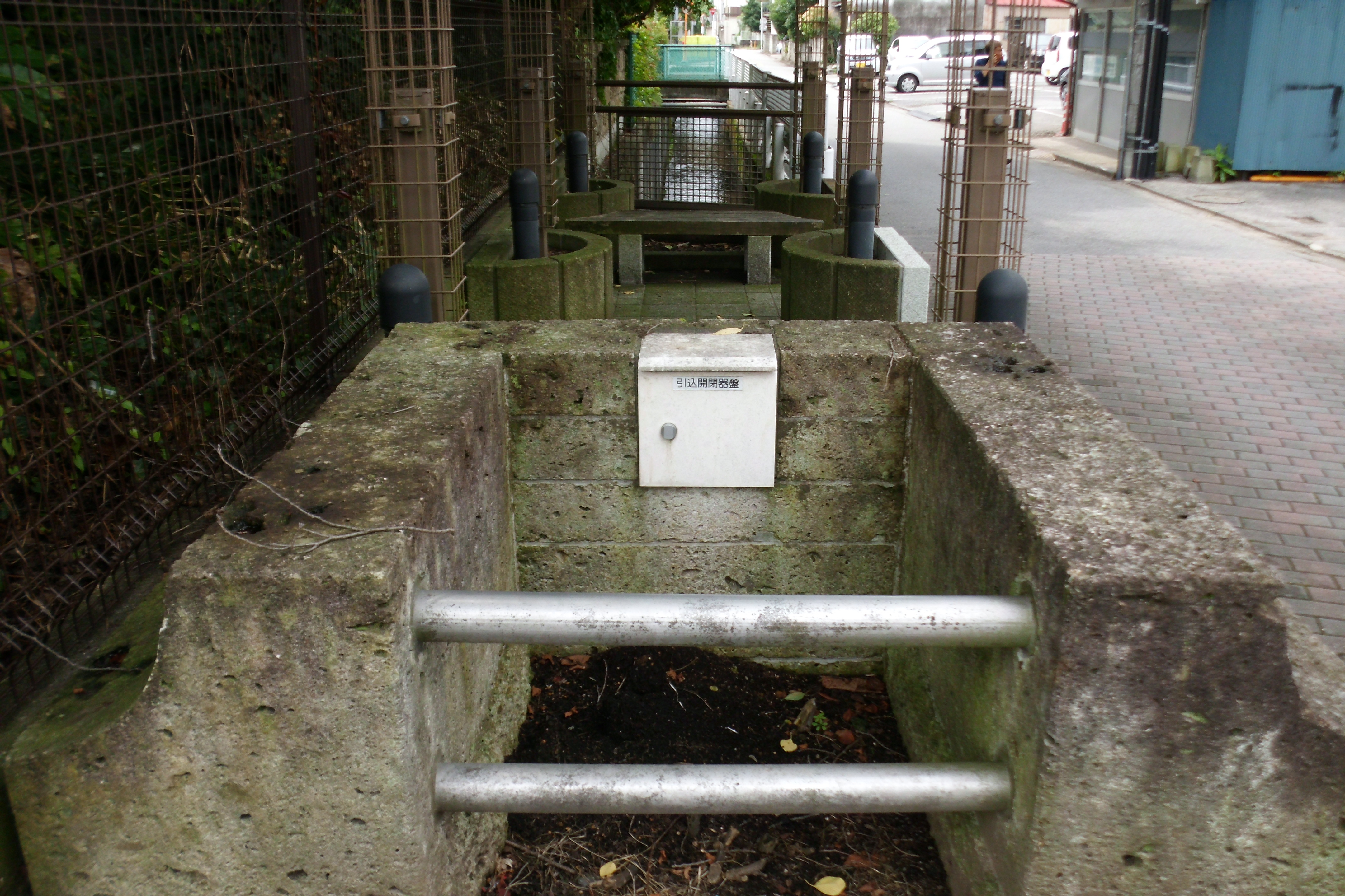 栃木県宇都宮市を流れる新川。二宮尊徳によって造られたことから二宮用水の総称もある。 宇都宮大通りの新川バス停付近。止水弁などの利水施設が地元産の大谷石で組まれている。